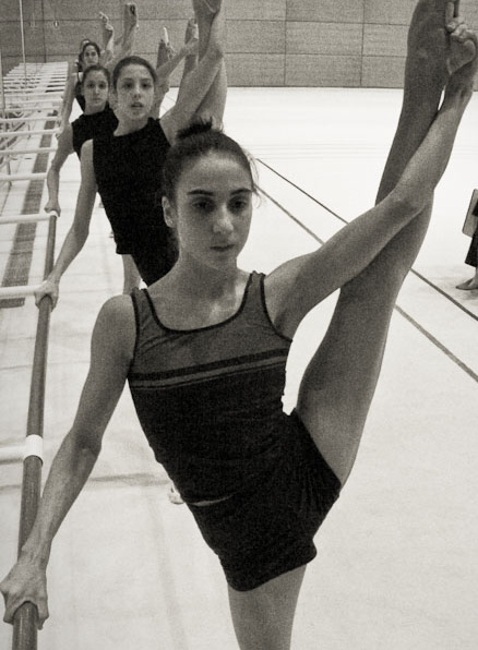 La gimnasta rítmica Nuria Velasco junto a otras componentes del conjunto nacional durante un entrenamiento en el CAR de Madrid en diciembre de 2003.